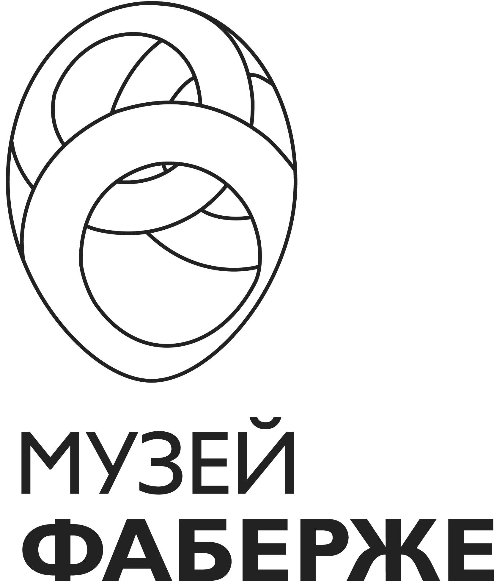 Логотип Музея Фаберже в Санкт-Петербурге.